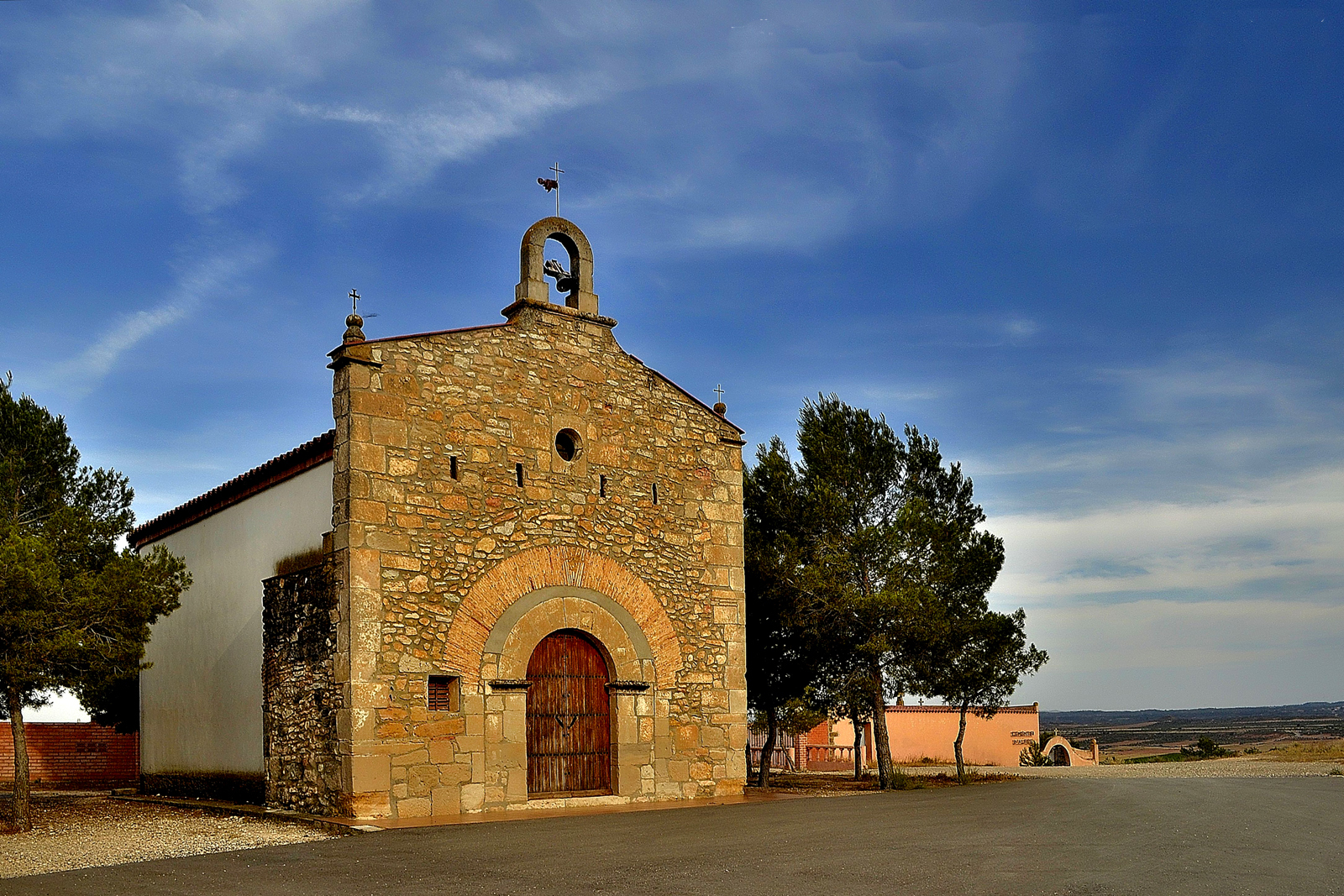 Ermita San Salvador (S.XVIII)